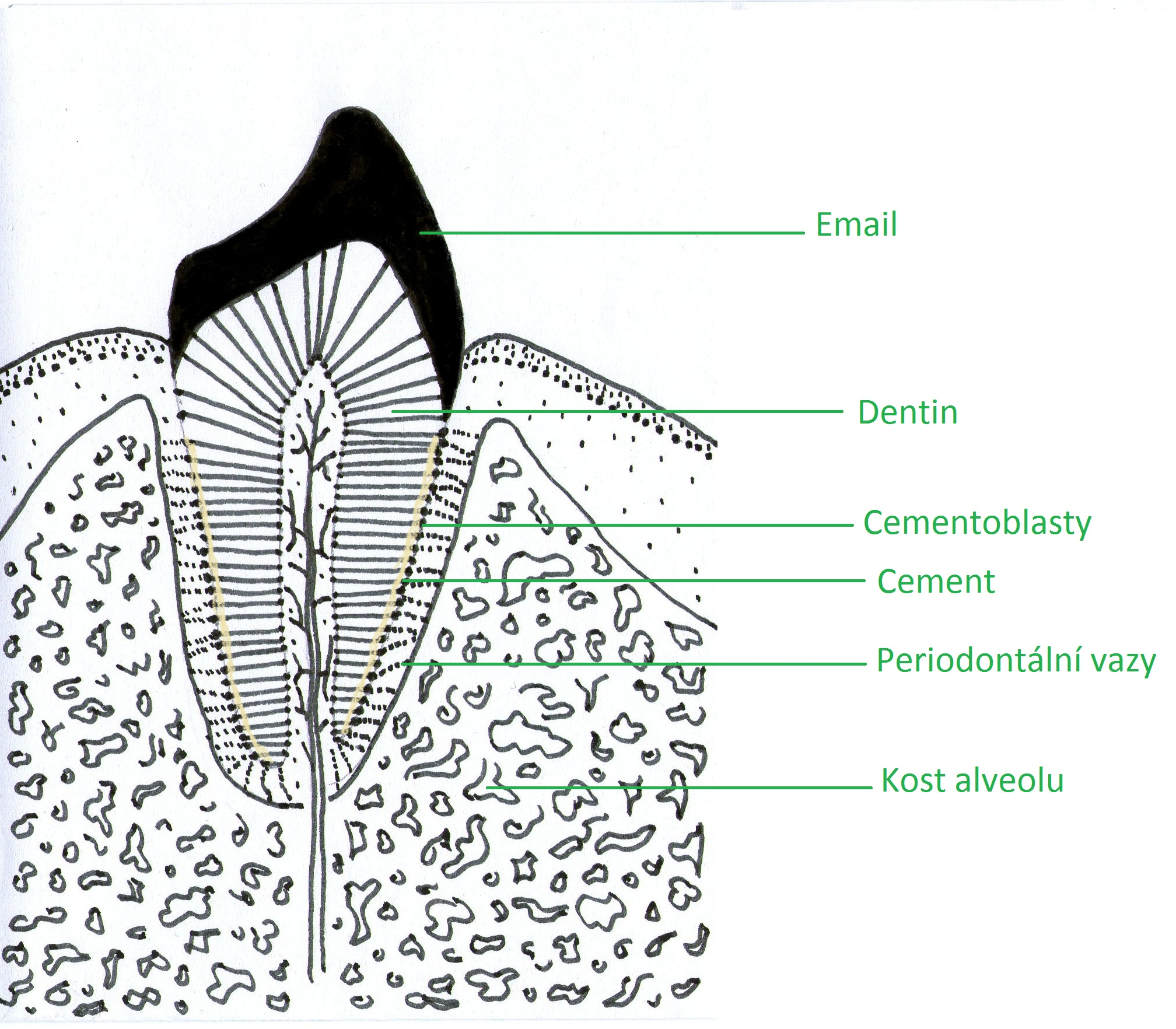 Perokresba zubu